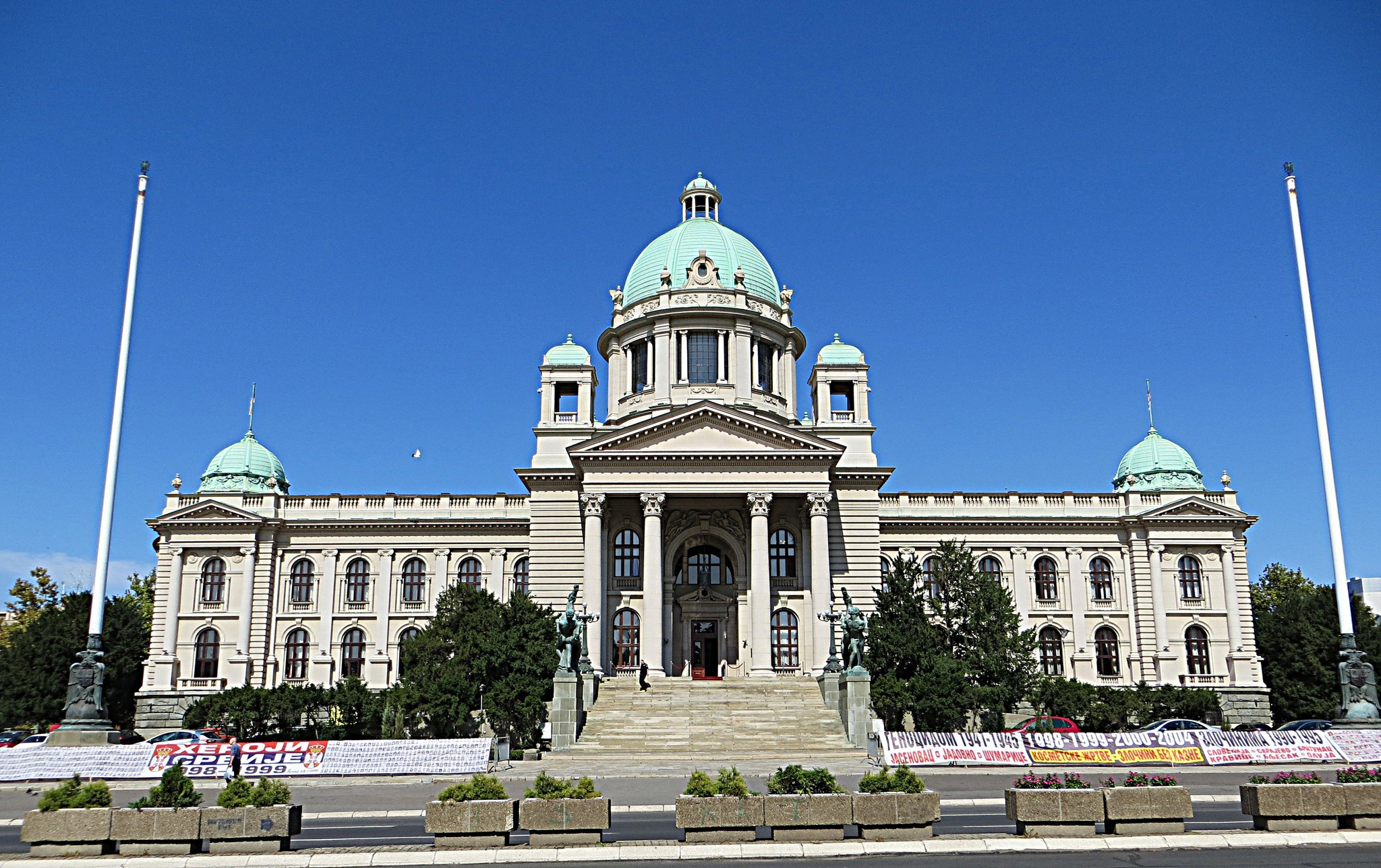 Narodna skupština